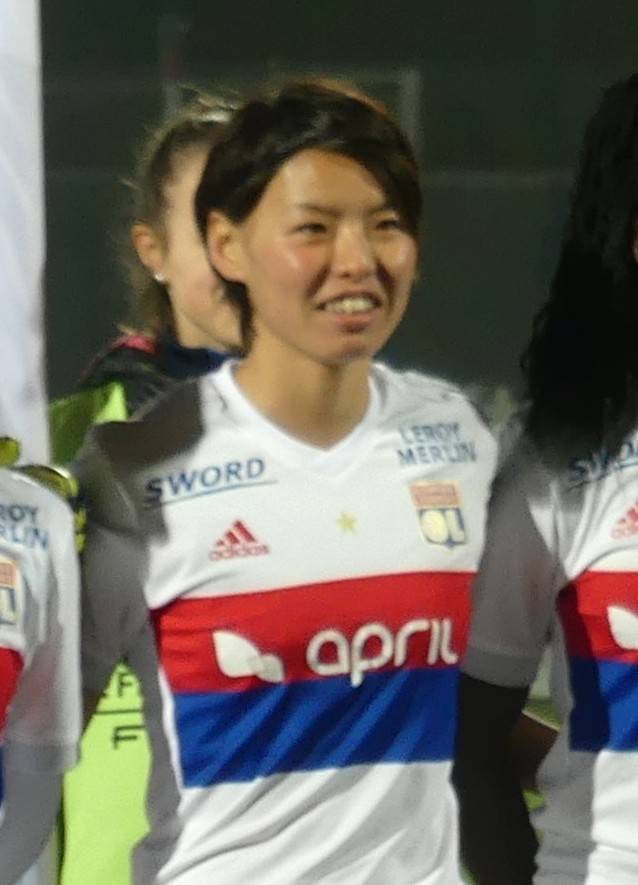 Saki Kumagai (熊谷紗希) le 5 février 2018 avec l'Olympique lyonnais.